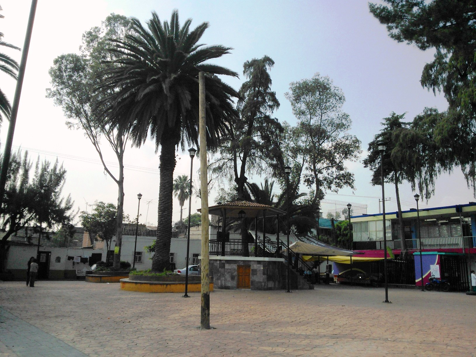 Plaza Hidalgo en Santa Anita Zacatlamanco